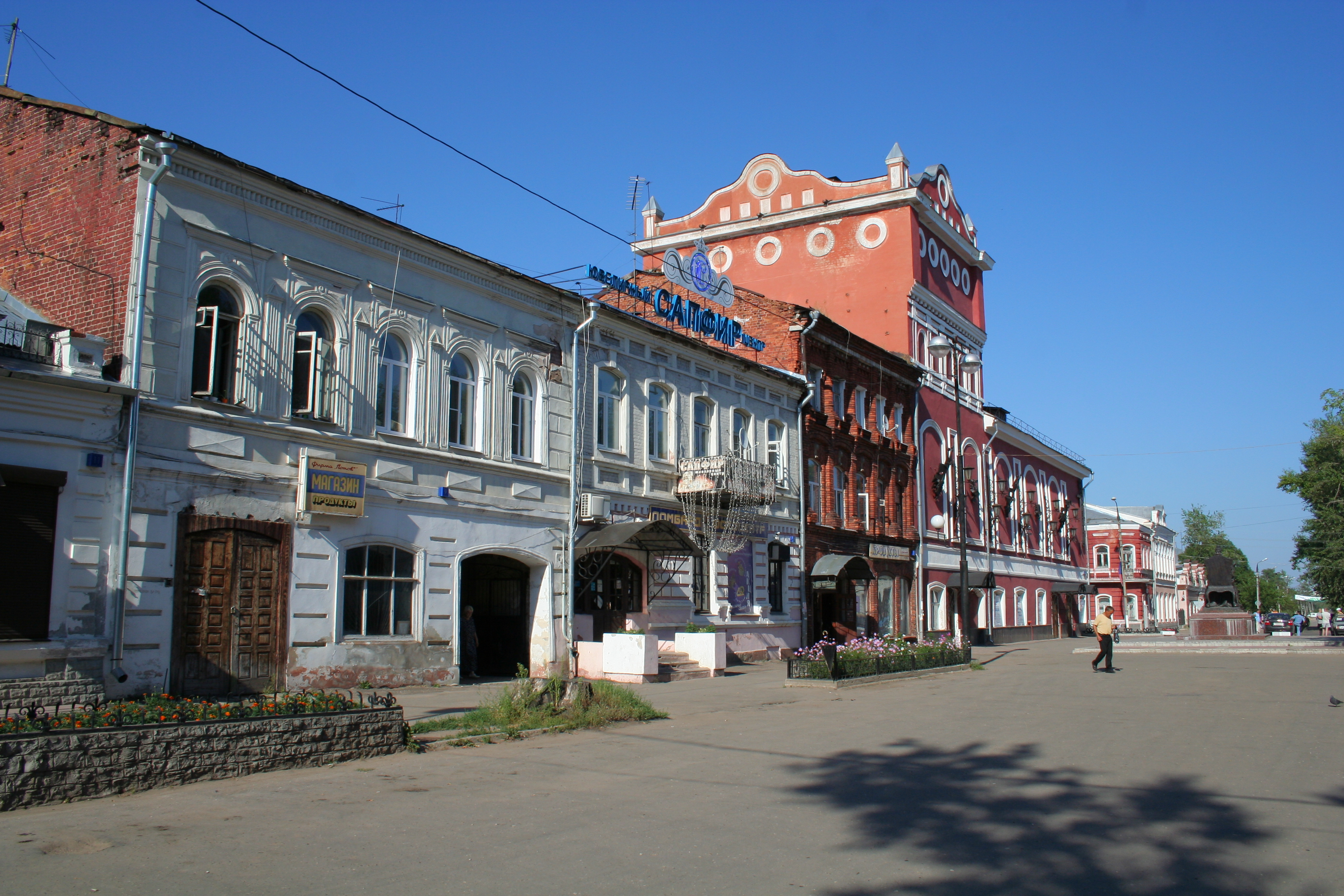 Ansichten der Stadt Wyschni Wolotschok (Oblast Twer, Russland). Stadtzentrum. Wantschakow-Linie.